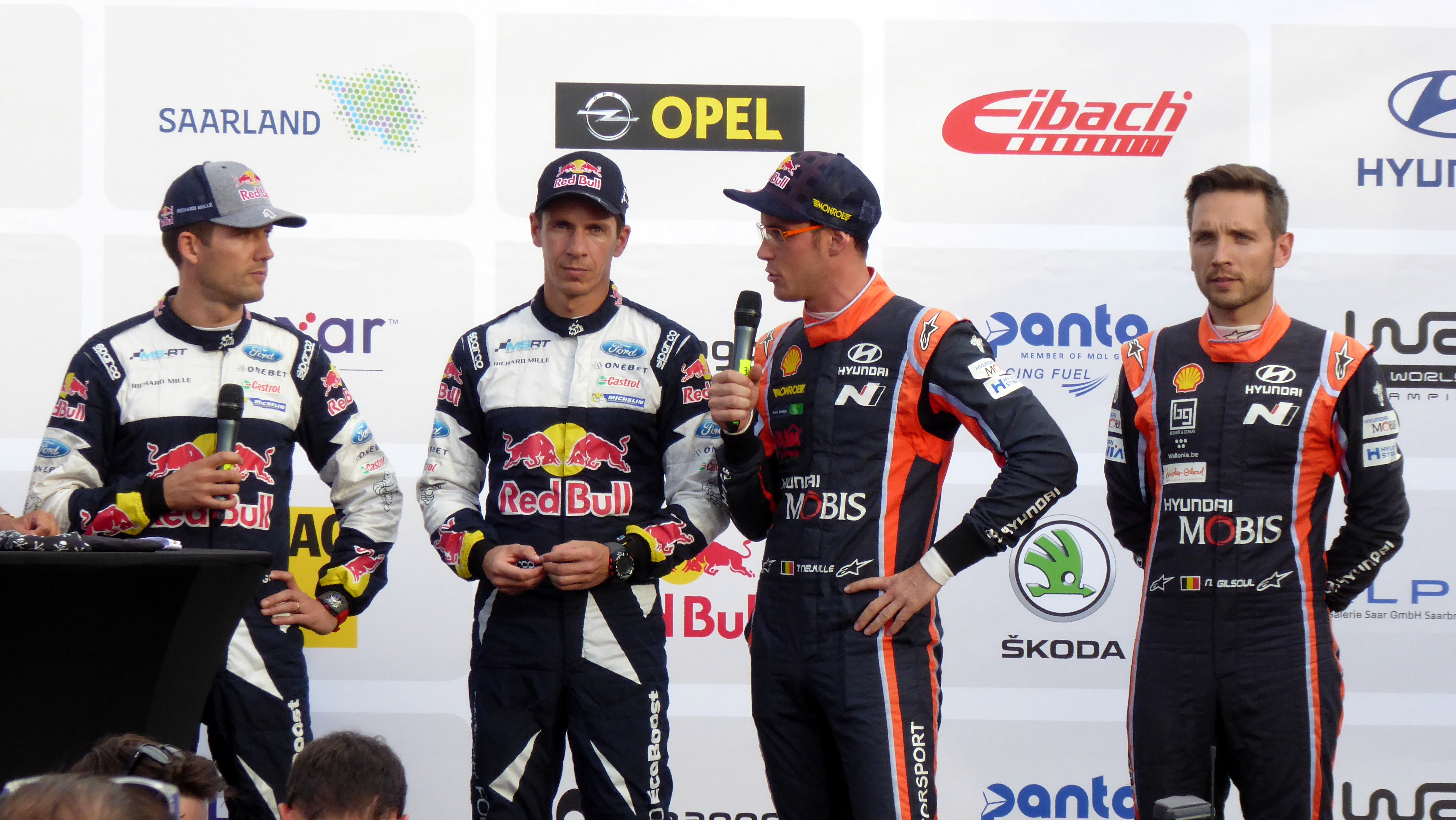 Rallye Deutschland 2017, Eröffnungszeremonie auf dem Tbilisser Platz in Saarbrücken